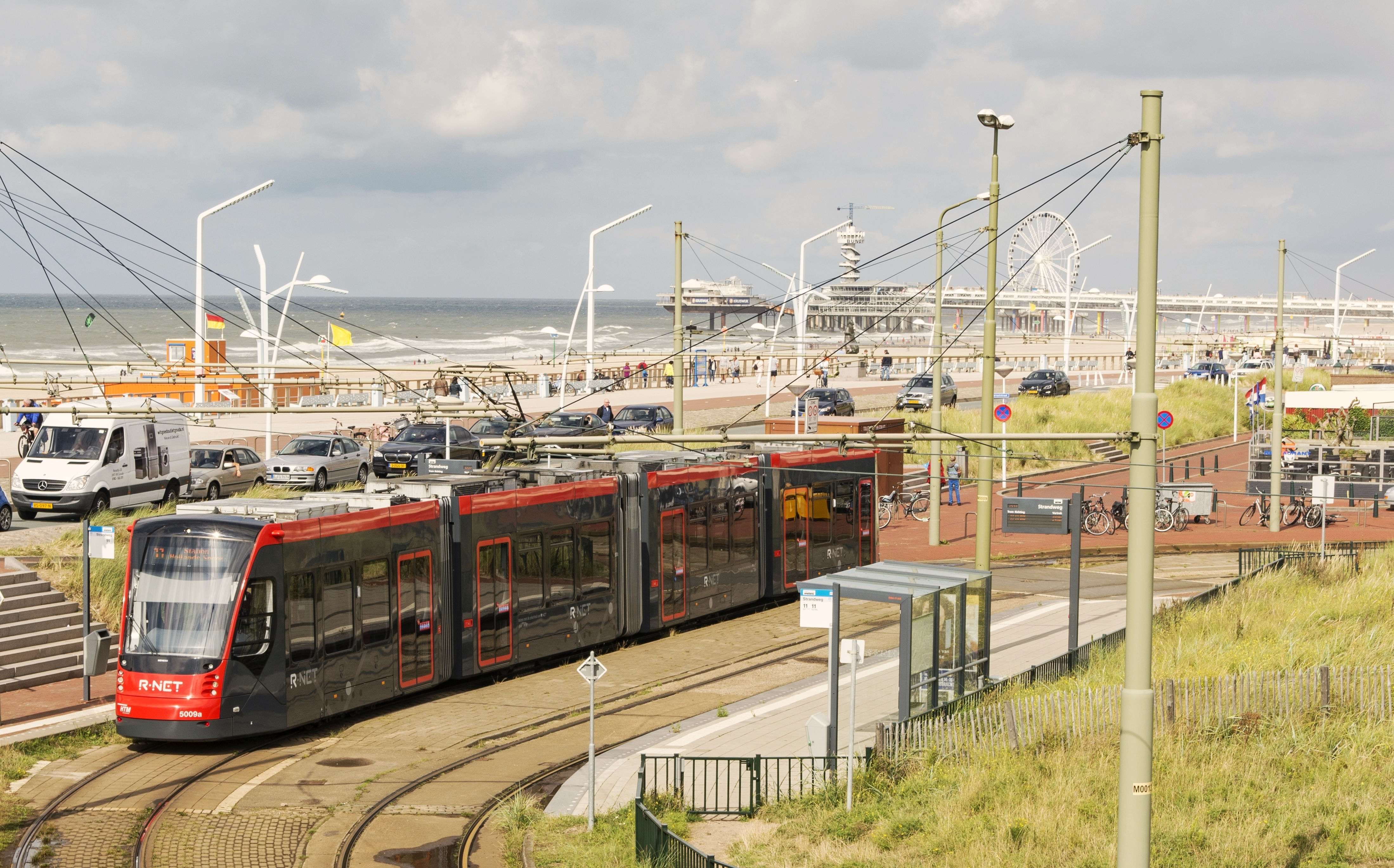 Avenio tram aan de halte Scheveningen Strandweg